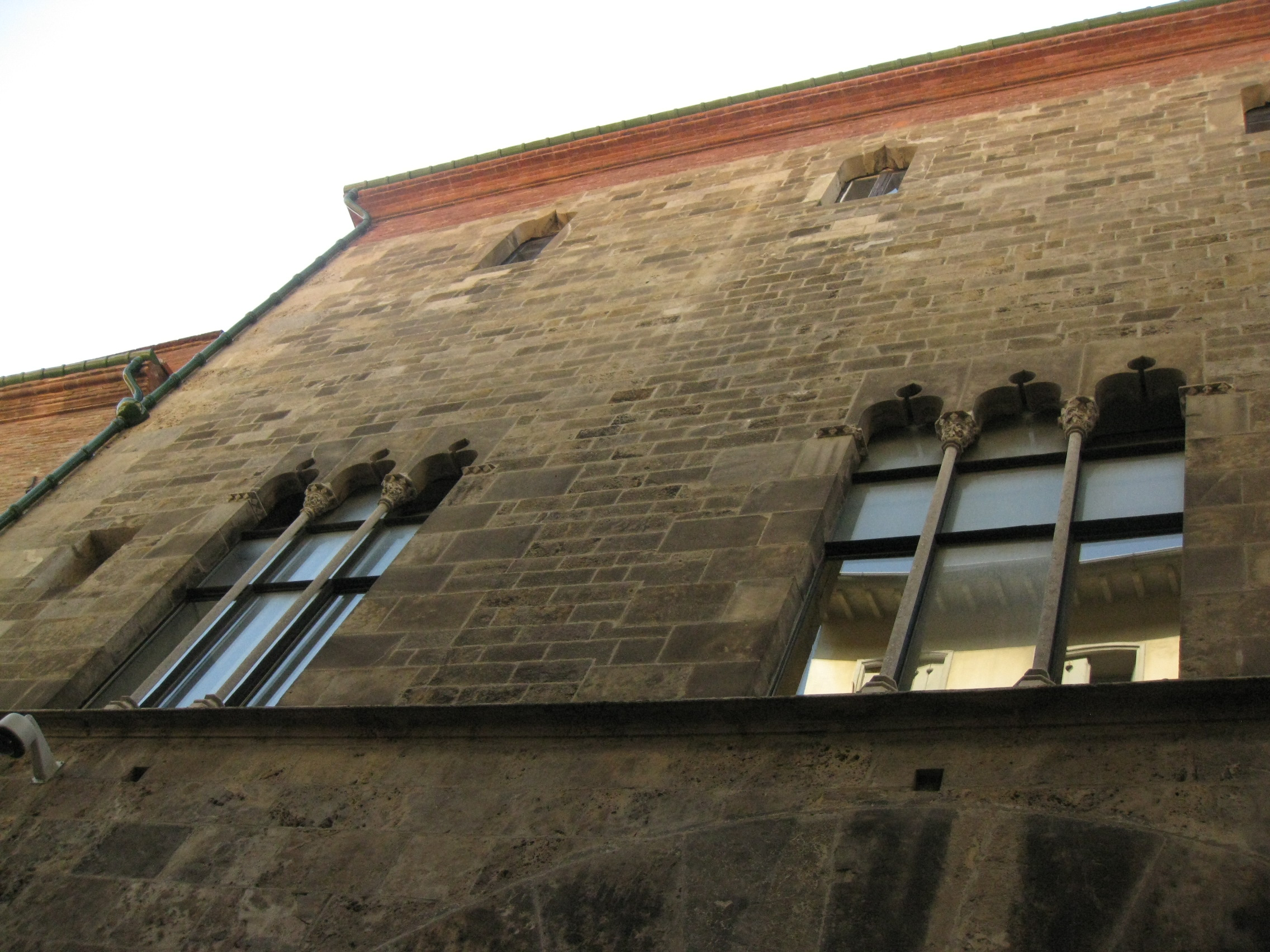 Palau de la Generalitat o de la Diputació, a Perpinyà; vista de la façana que dóna al carrer de la Llotja .